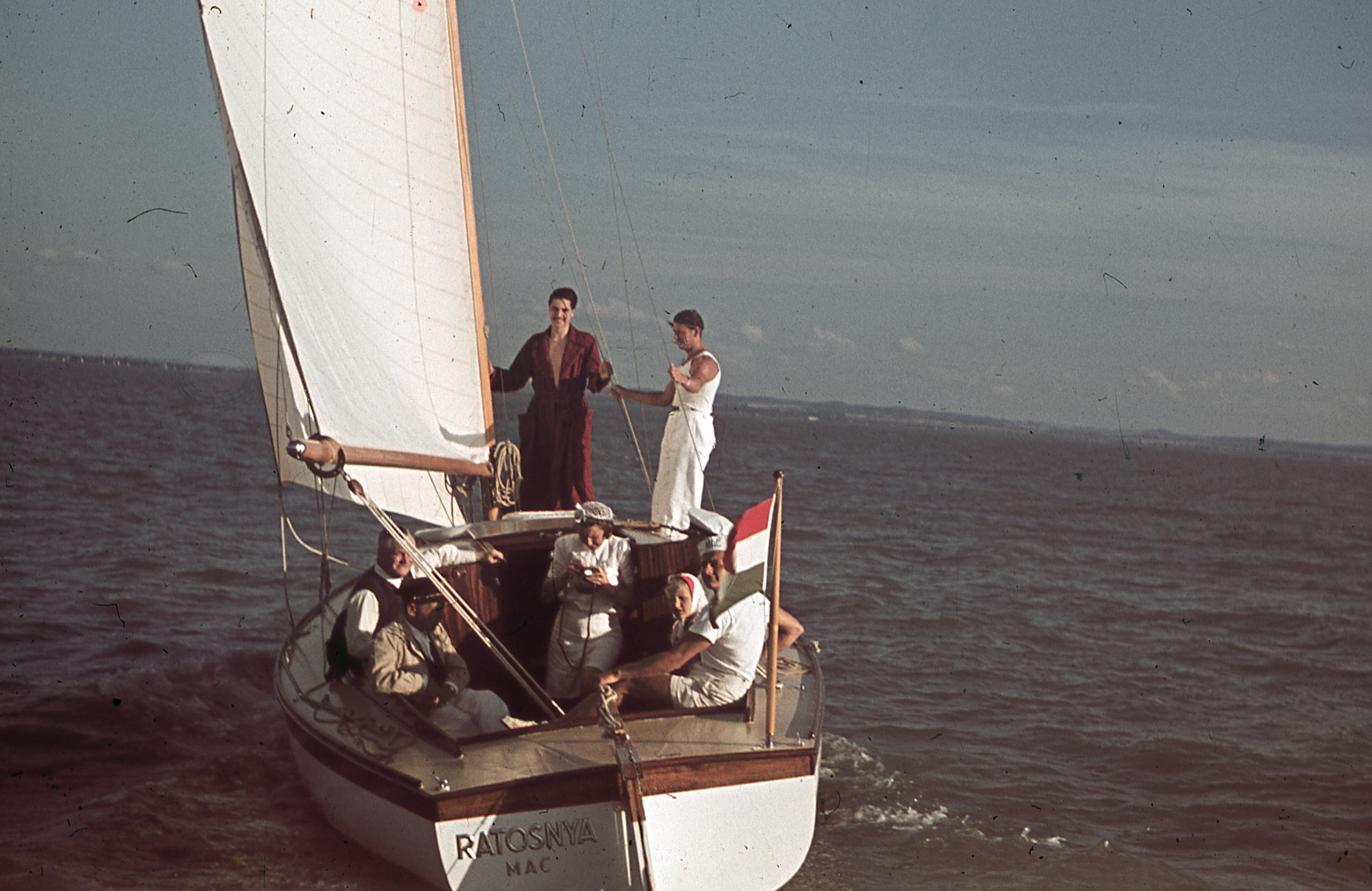 30-as túrajolle. Location: Hungary, Lake Balaton Tags: colorful Title: 30-as túrajolle.